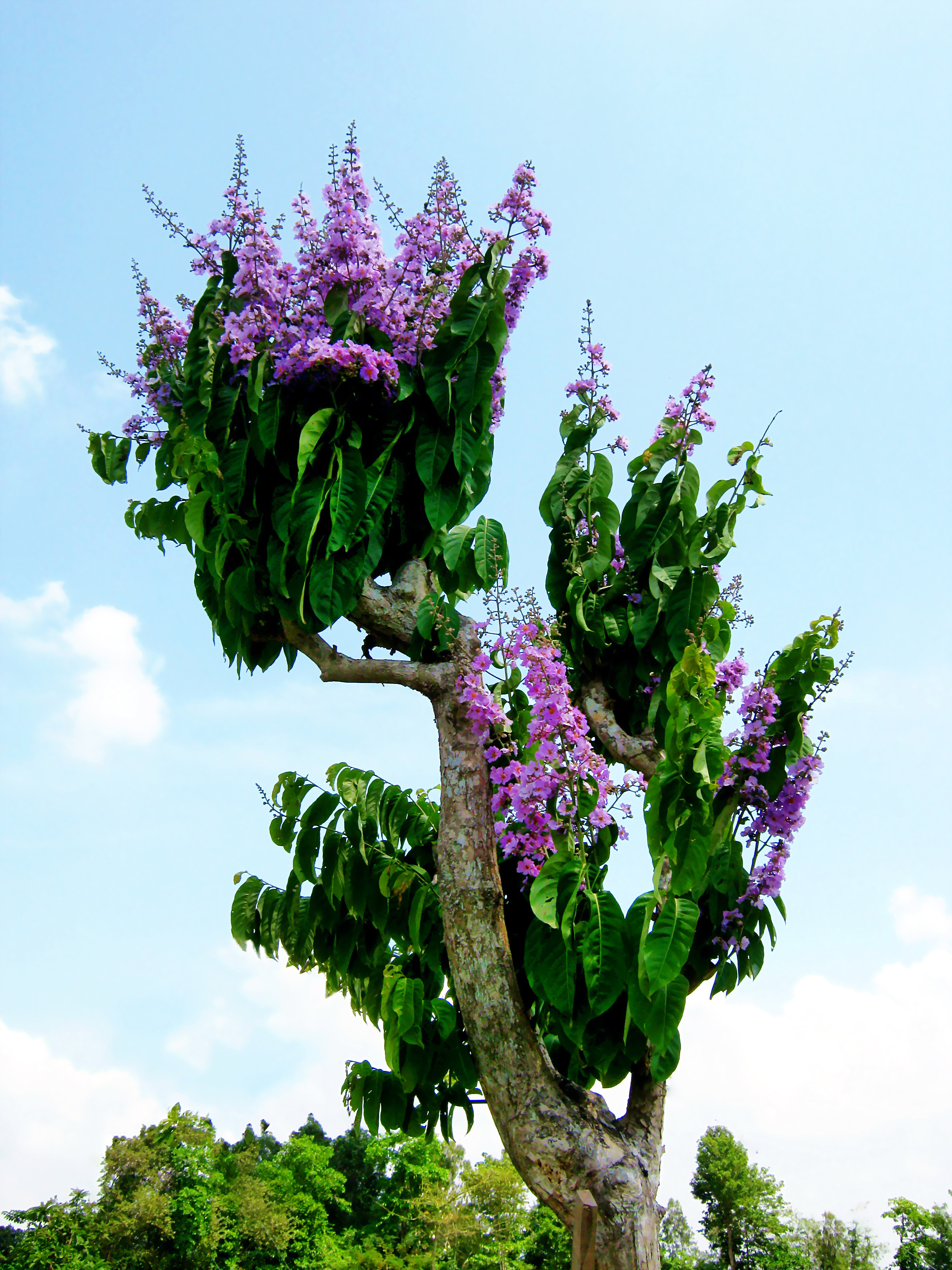 Bằng lăng tím ở ở Long Xuyên (An Giang, Việt Nam).